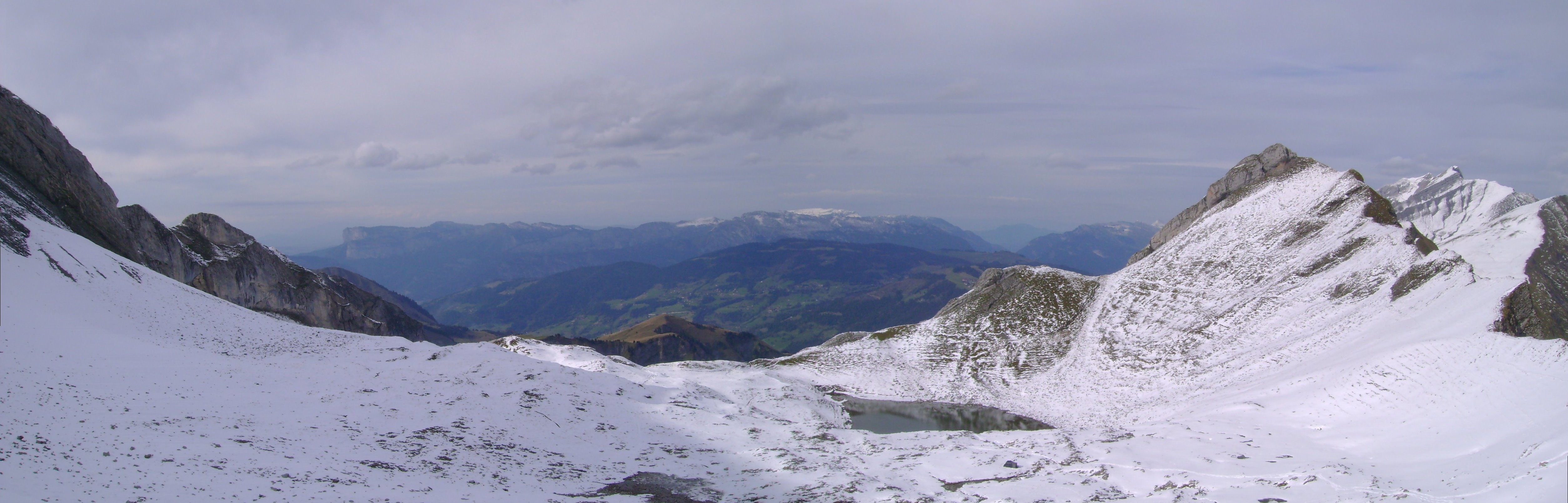 Lac du Charvin - Charvin's lake.